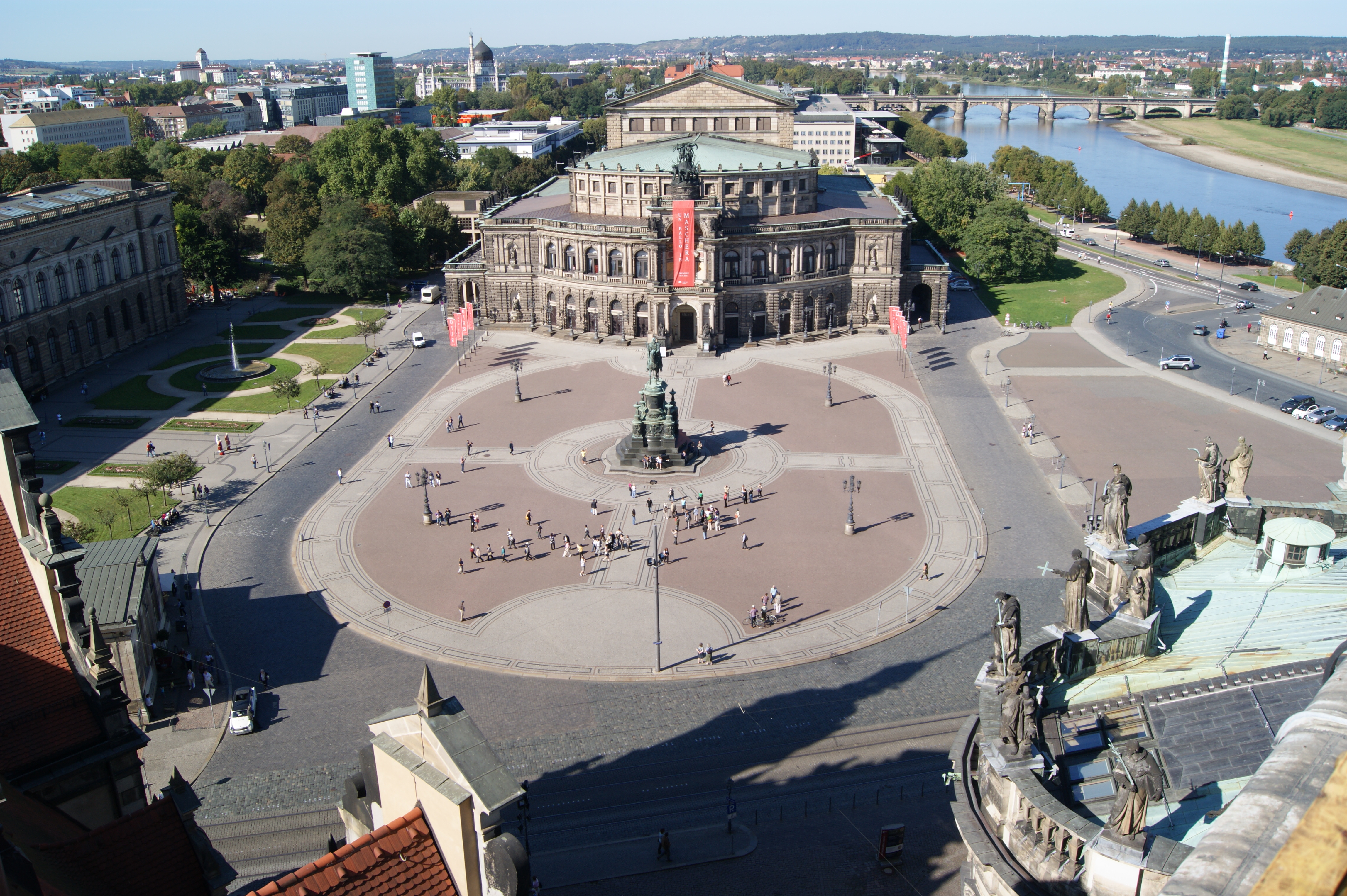 Dresden: Blick vom Hausmannsturm des Residenzschlosses auf den Theaterplatz mit der Semperoper